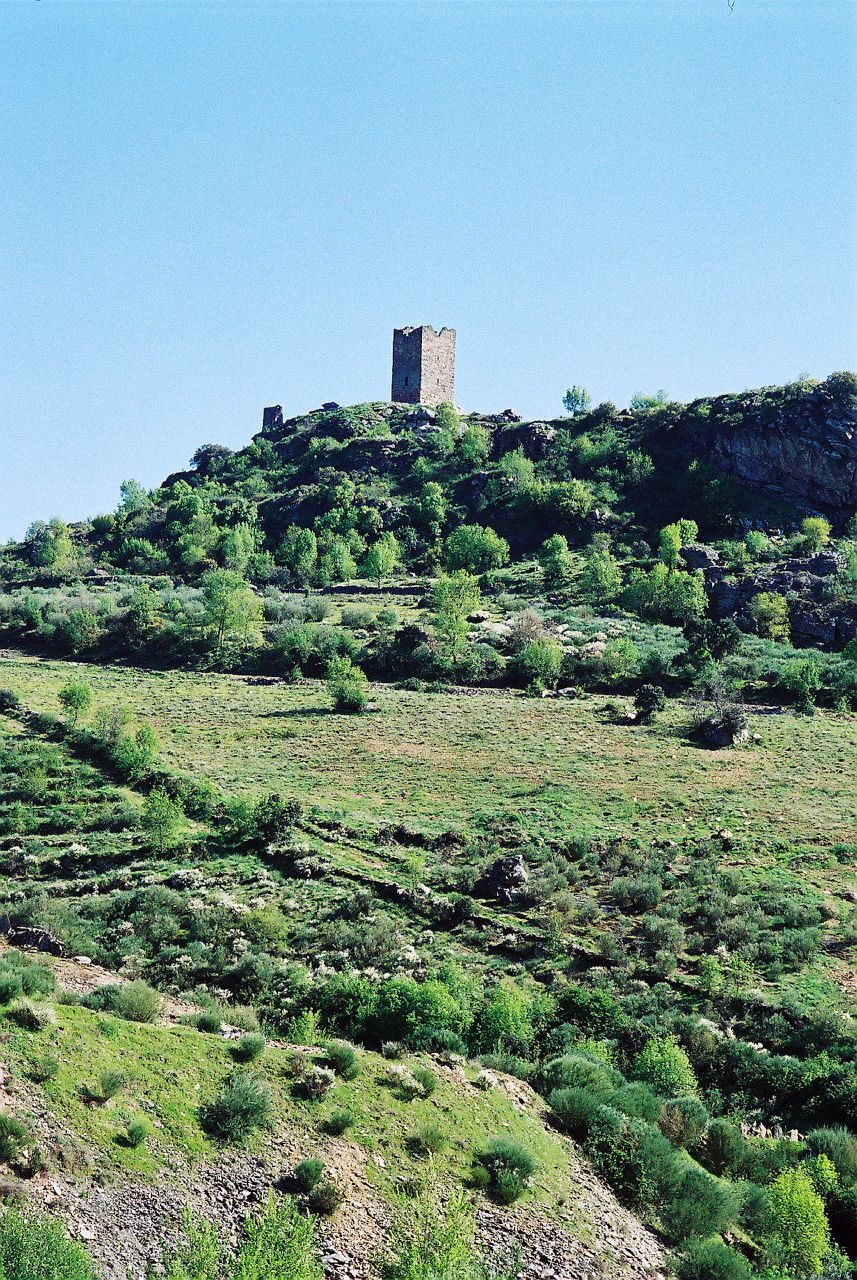 Panorama 360º